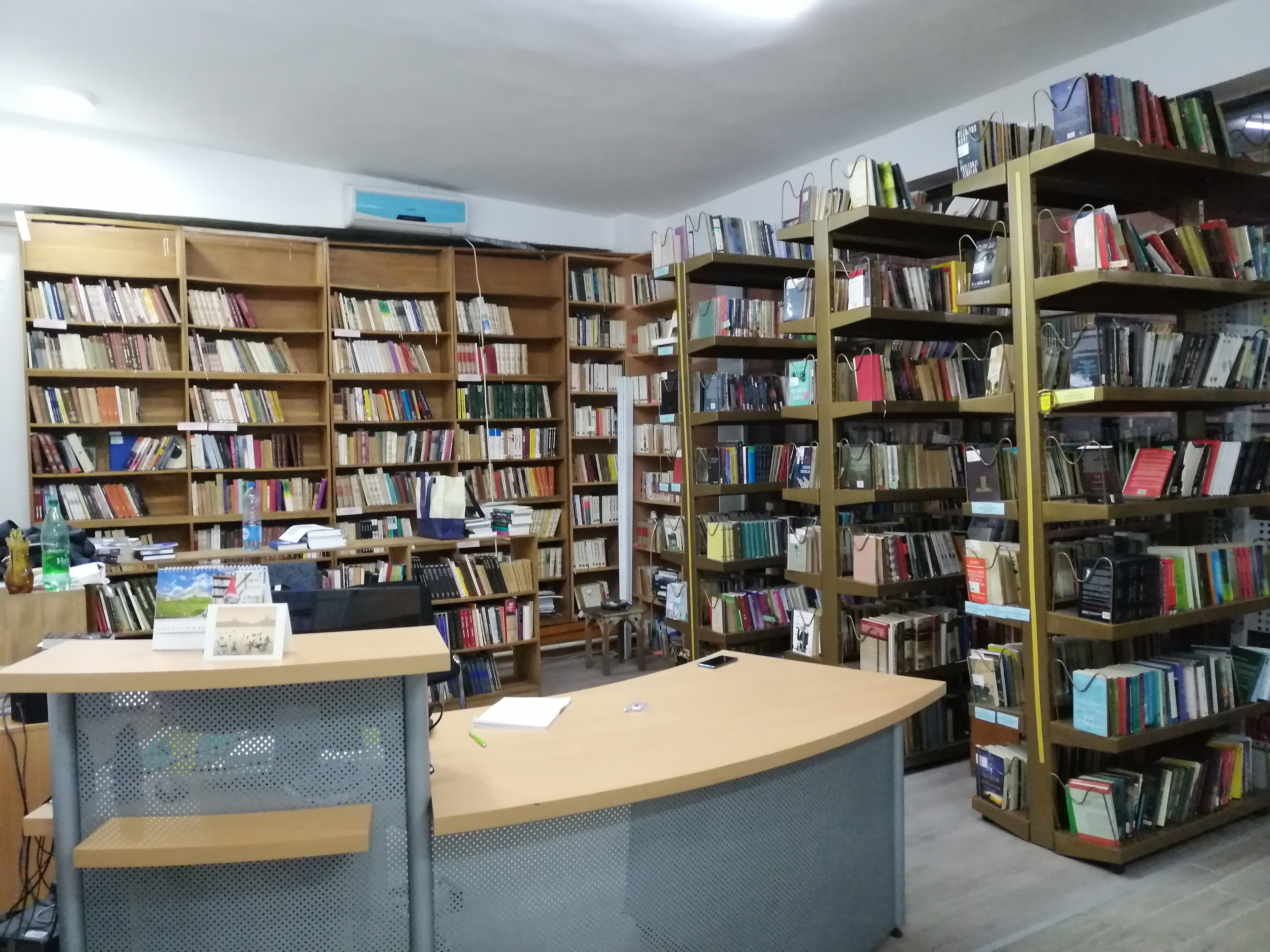 Narodna biblioteka Pirot, odraslo odeljenje